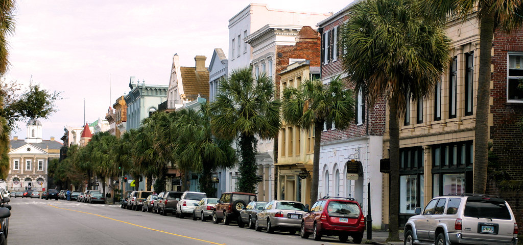 Downtown Charleston (South Carolina, USA); Broad Street.